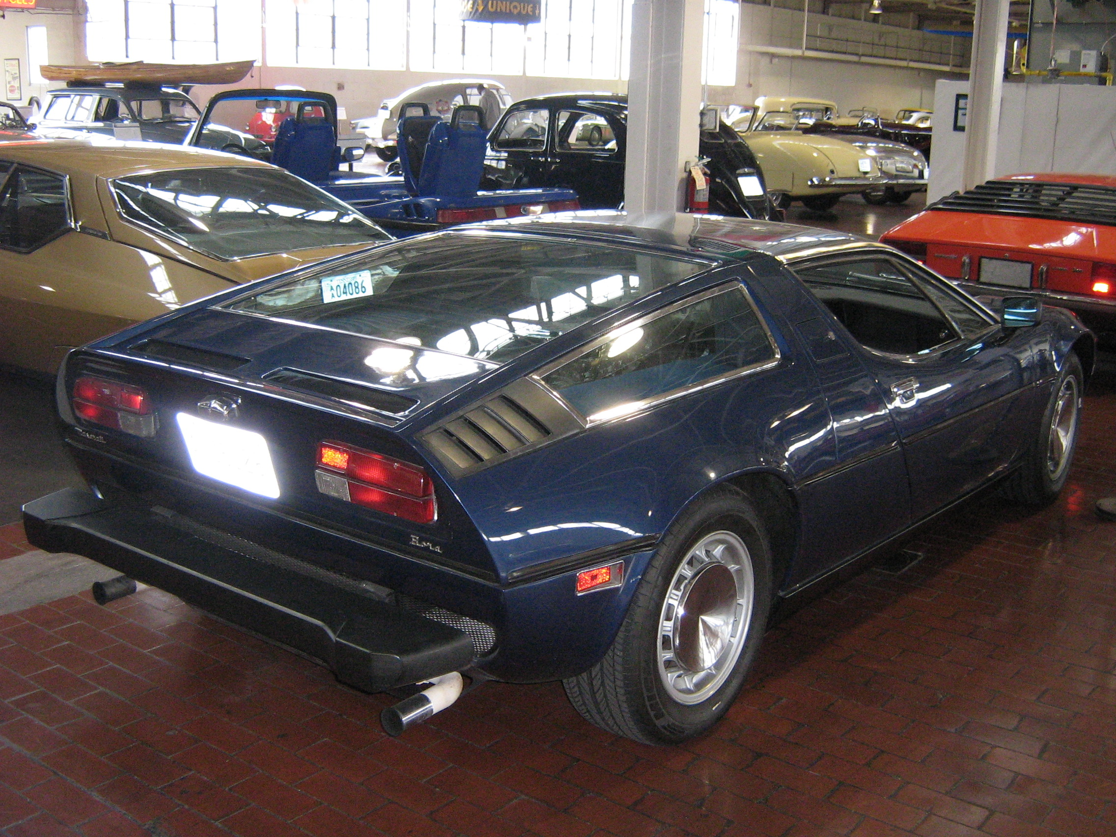 1975 Maserati Bora